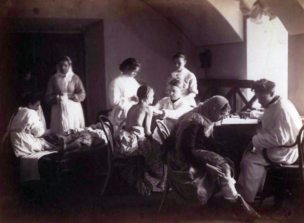 Болдырев И.В., Приемный покой в Обуховской больнице, 1887. - Альбуминовый отпечаток